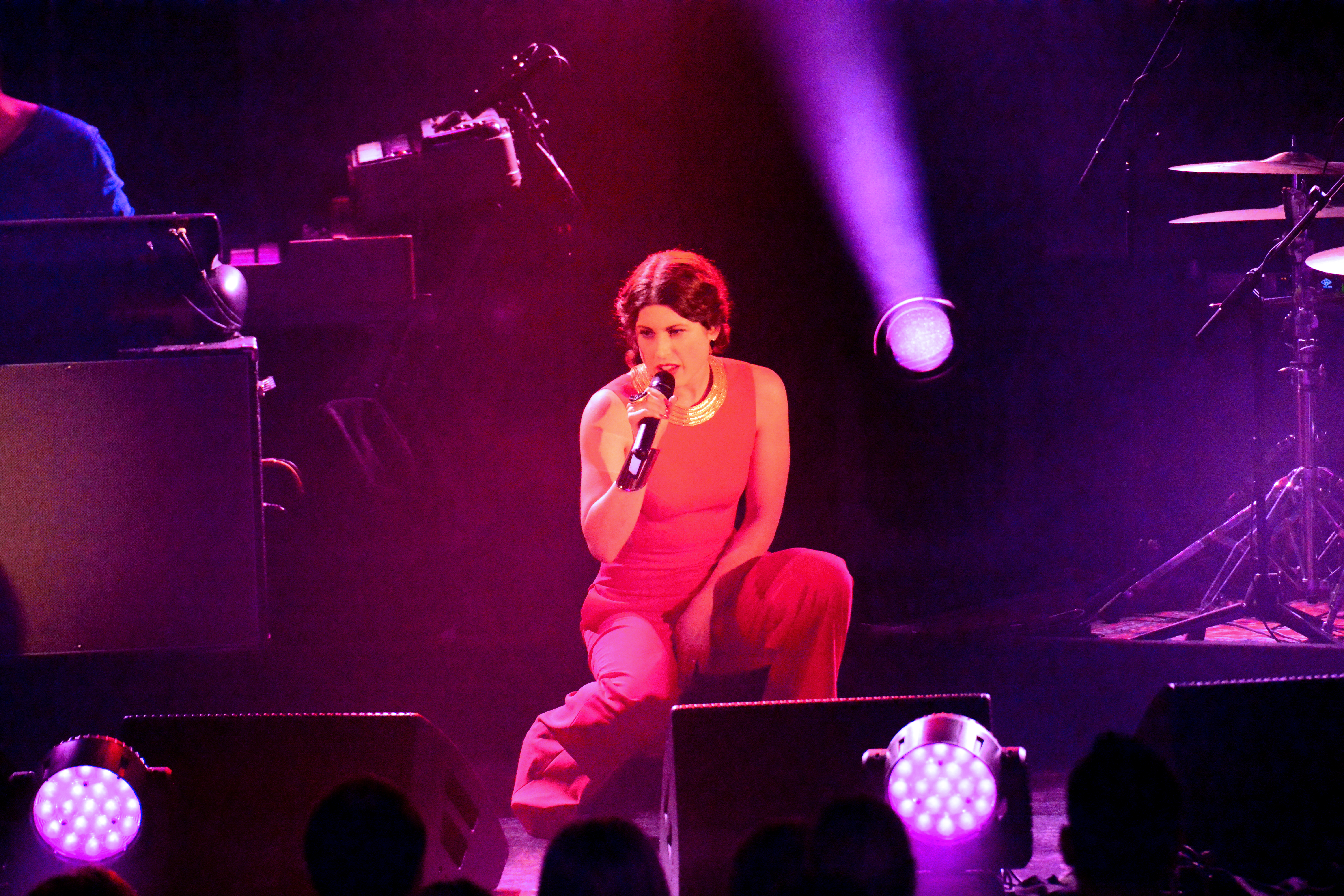 Ann Sophie bei der Live Show des Clubkonzerts - Unser Song für Österreich in der „Großen Freiheit 36“ in Hamburg